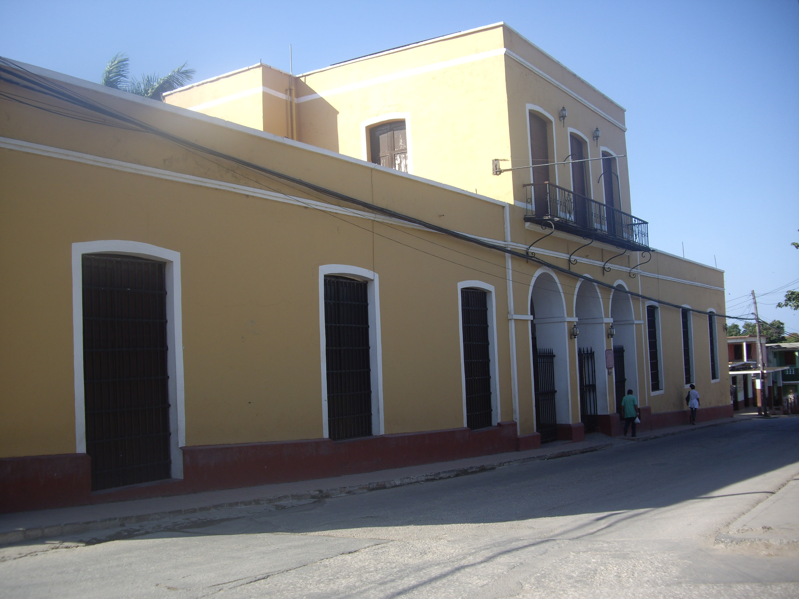 Edifici actual del que va ser la Real Cárcel